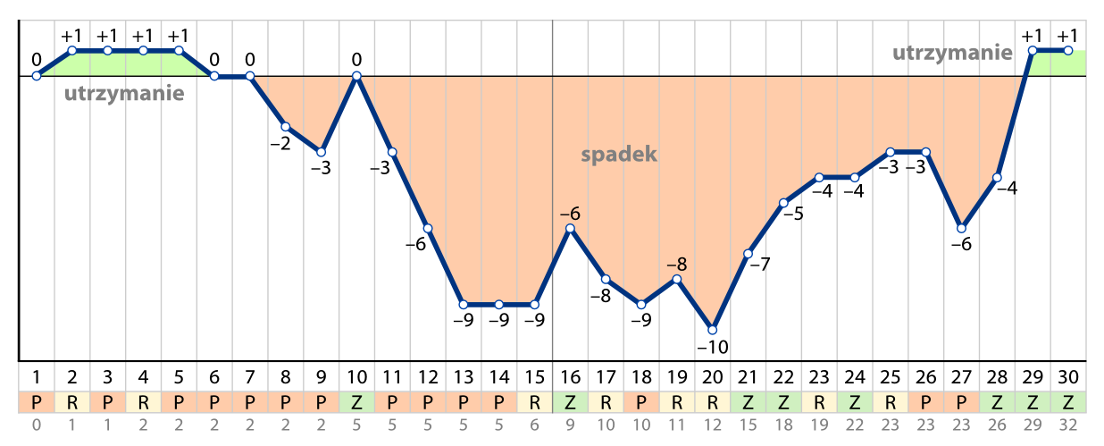 Wykres przedstawiający przewagę nad strefą spadkową i stratę do miejsc gwarantujących utrzymanie Podbeskidziu Bielsko-Biała w sezonie Ekstraklasy 2012/2013.